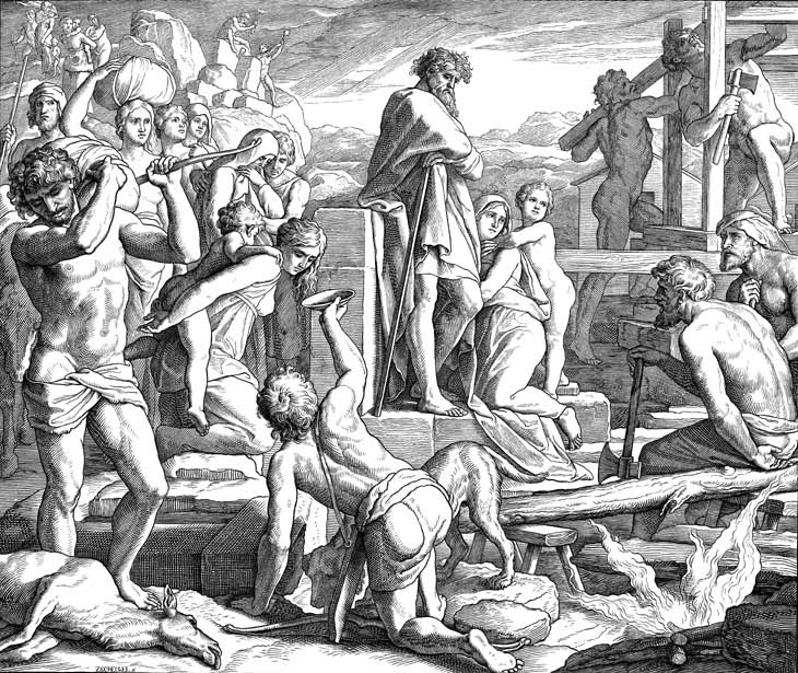 Woodcut for "Die Bibel in Bildern", 1860. Holzschnitt aus "Die Bibel in Bildern", 1860. Kain gründet eine Stadt und benennt sie nach seinem Sohn Henoch. Gravure en bois pour «Die Bibel in Bildern», 1860.